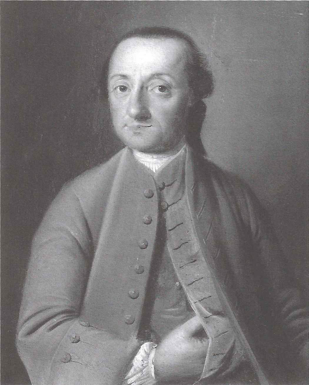 Bildnis Wilhelm Emanuel Dittlinger, Hafnermeister.